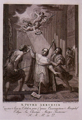 Martirio de San Pedro Arbués, grabado al aguafuerte, Archivo de La Seo, Zaragoza, España